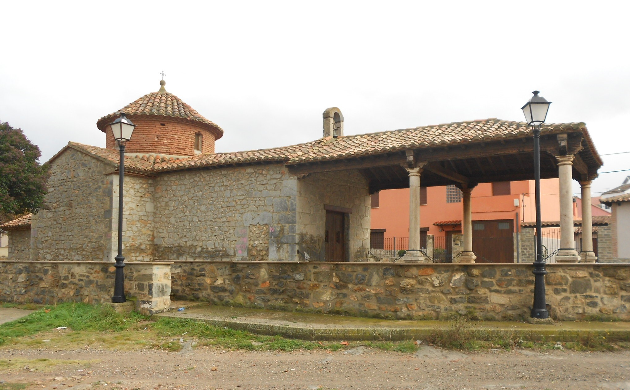 Ermita de San Roque (Sarrión, España)